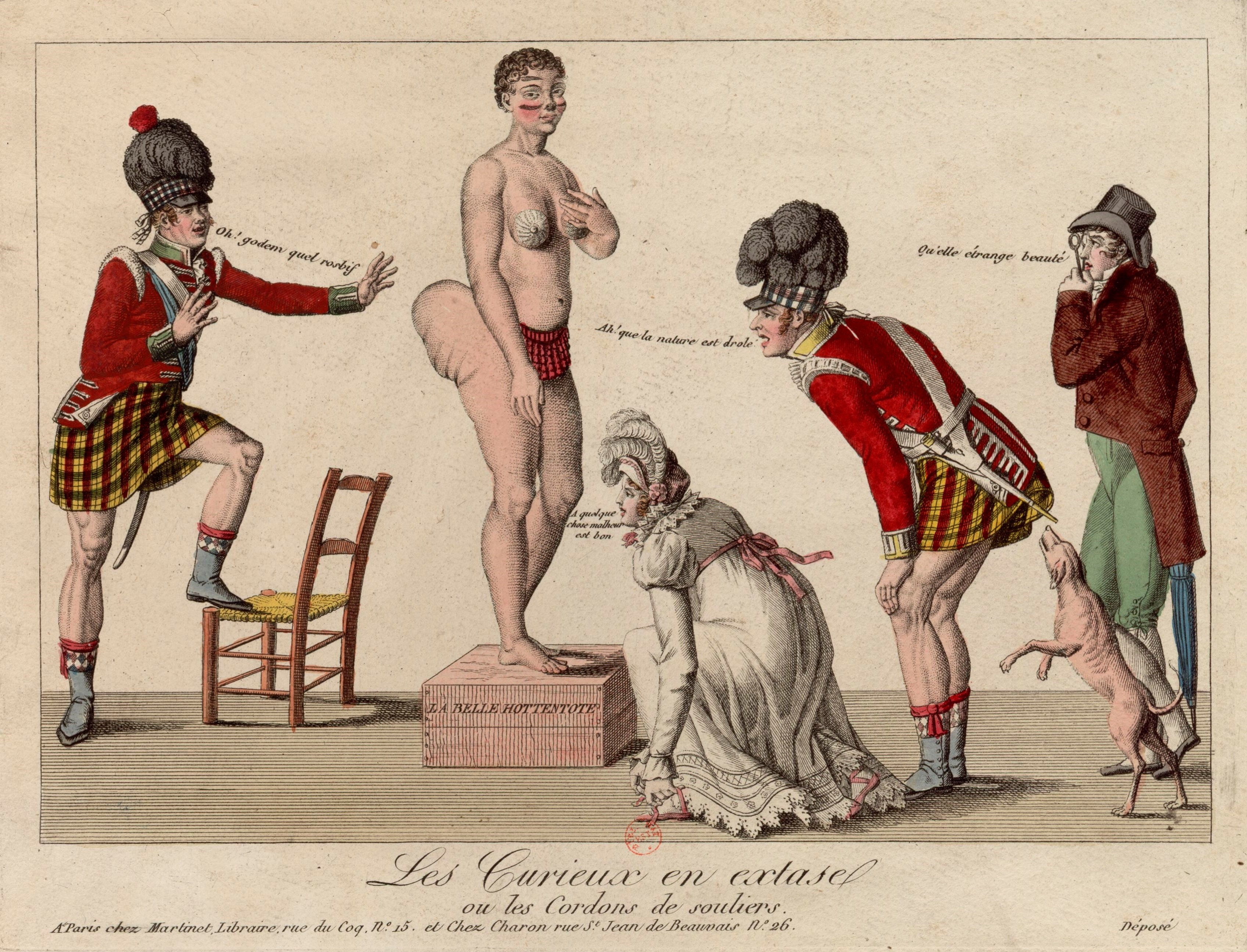 Les Curieux en extase ou les Cordons de souliers